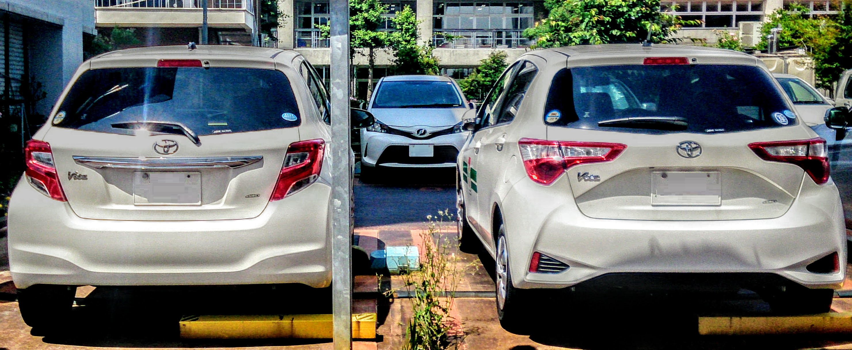 トヨタ Vitz 3代目・後部